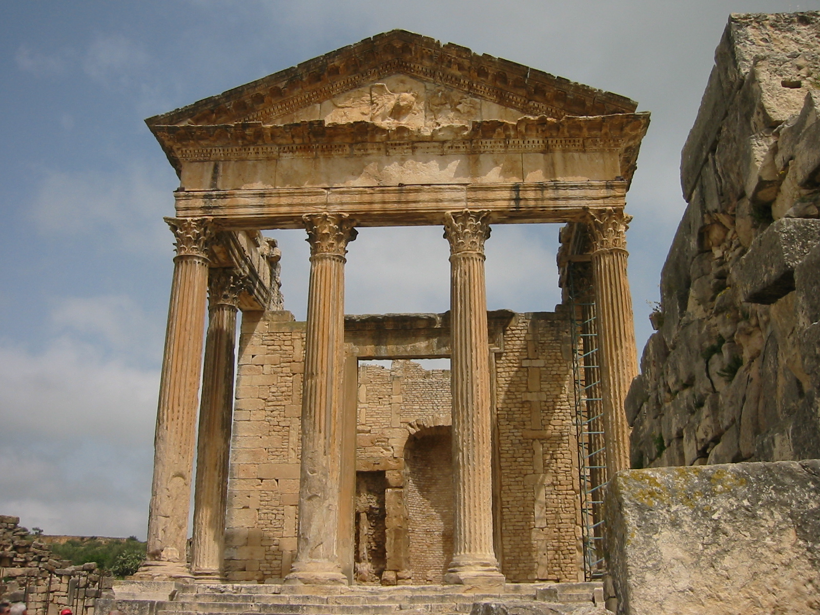 Kapitol in Thugga Tunesien